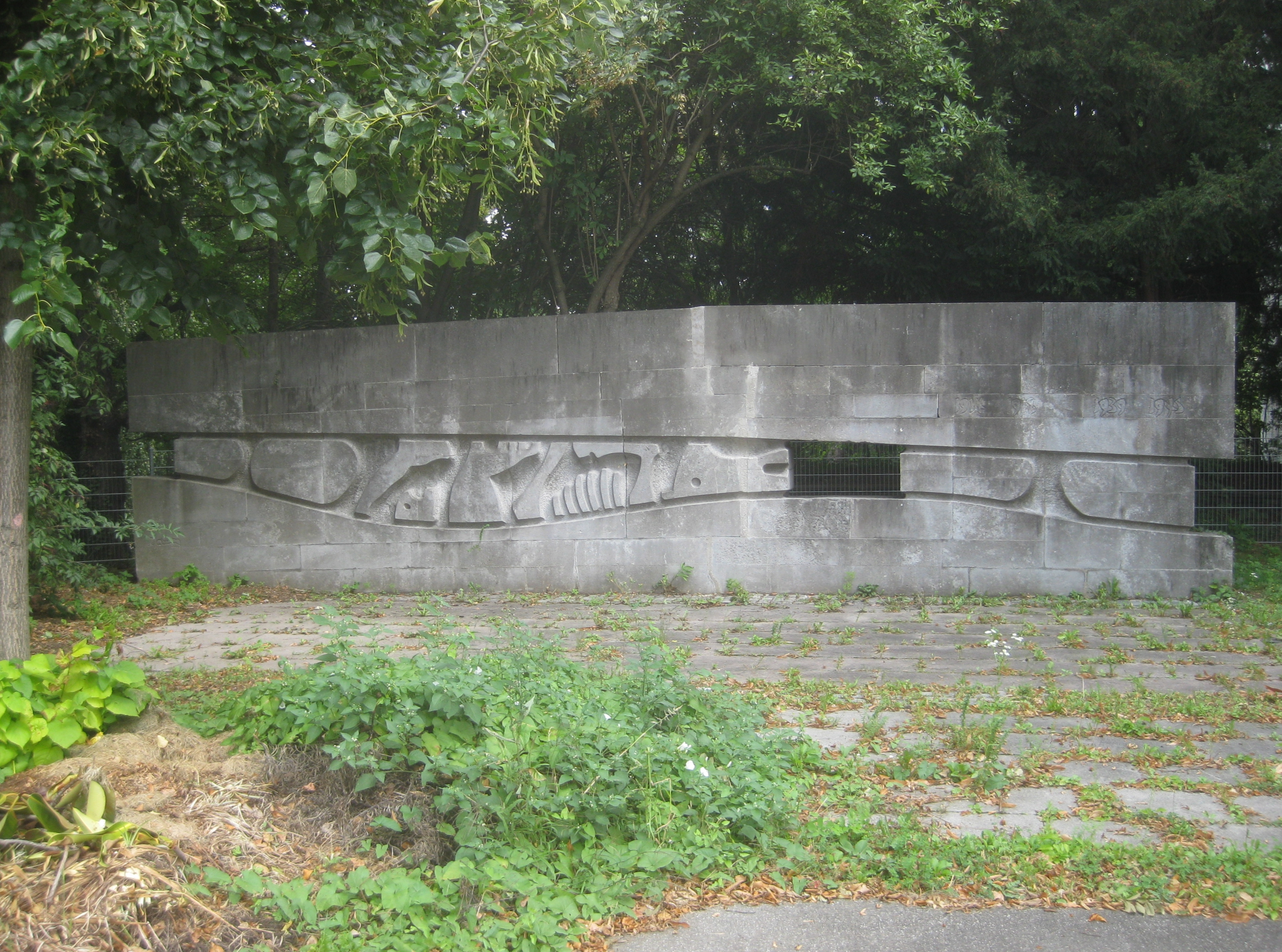 Mahnmal für die gefallenen Schüler von Otto Baum, doppelseitiges Mauerrelief, Stuttgart-Berg, Johann-Friedrich-von-Cotta-Schule, Schulhof, Werkverzeichnis Nr. 200, Muschelkalk, Höhe x Breite x Tiefe: 2,4 x 10 x 0,6 m, bezeichnet: „Baum“, 1960, Stuttgart, Sickstraße 165.